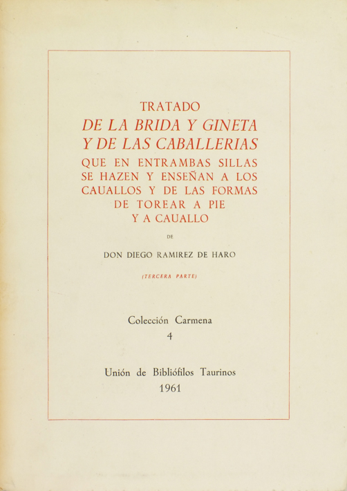 Portada de una edición del Tratado de la brida y jineta, escrito por Diego Ramírez de Haro en el siglo XVI.